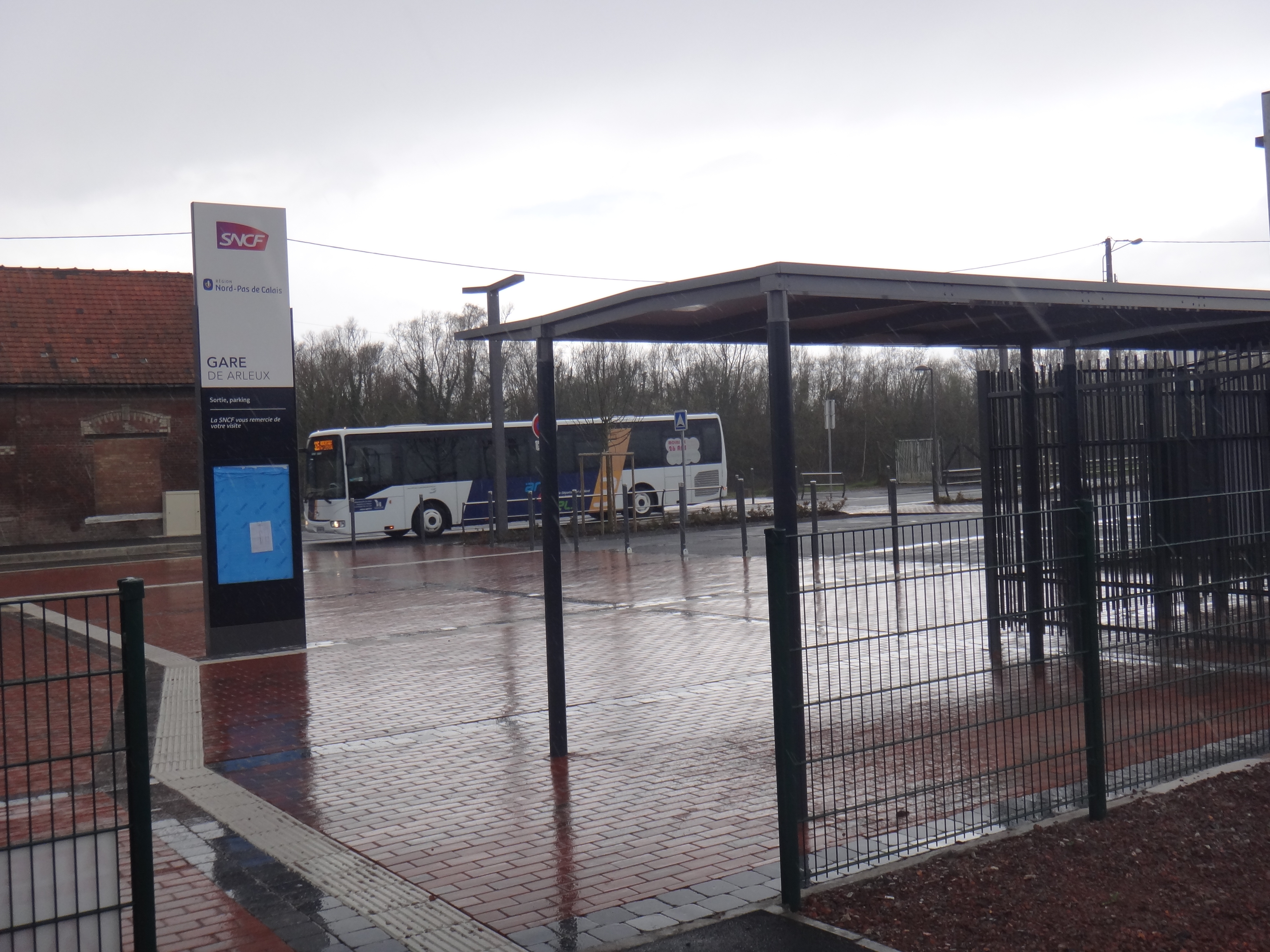 Gare de Arleux, Nord, France, en 2014